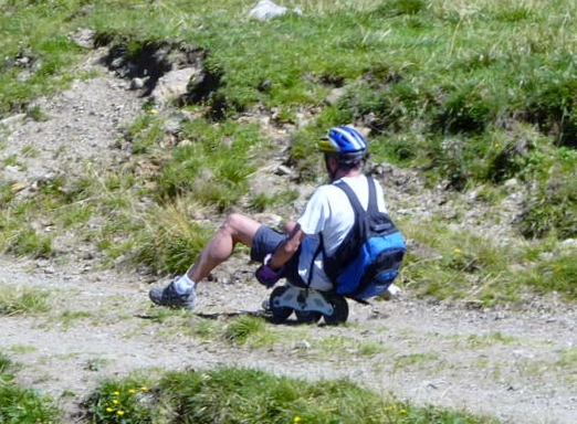 Böckl estivo